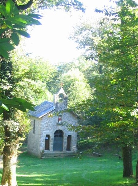 La chapelle Saint Martin de Saint-Symphorien-sur-Couze est située au coeur des bois, elle est un haut lieu de pèlerinage en Haute-Vienne.